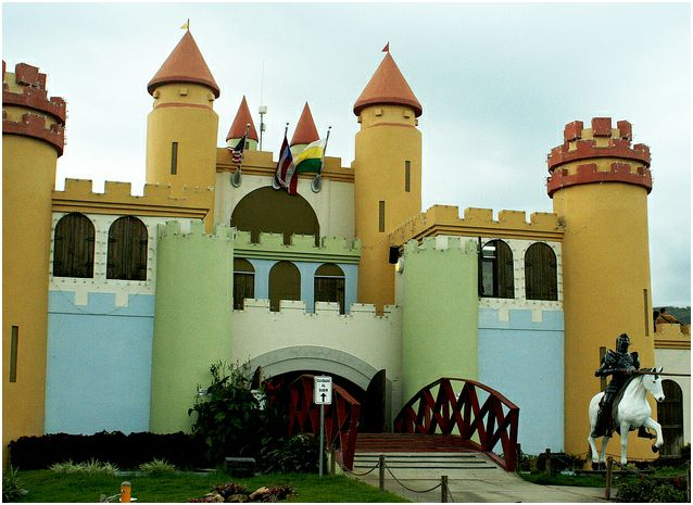 Castillo Nino